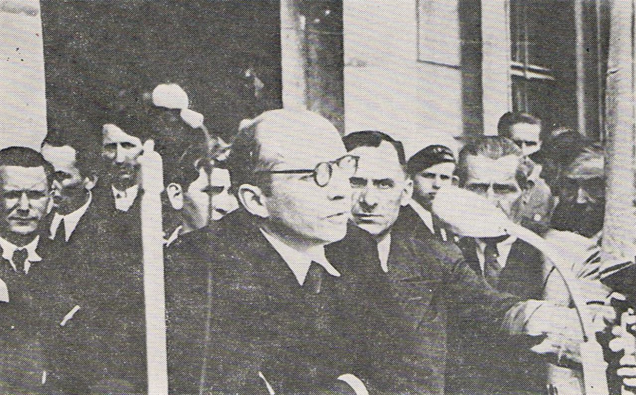 Przemówienie Piotra Zaremby na pl. Wolności w Poznaniu w dniu 13.05.1945 r.